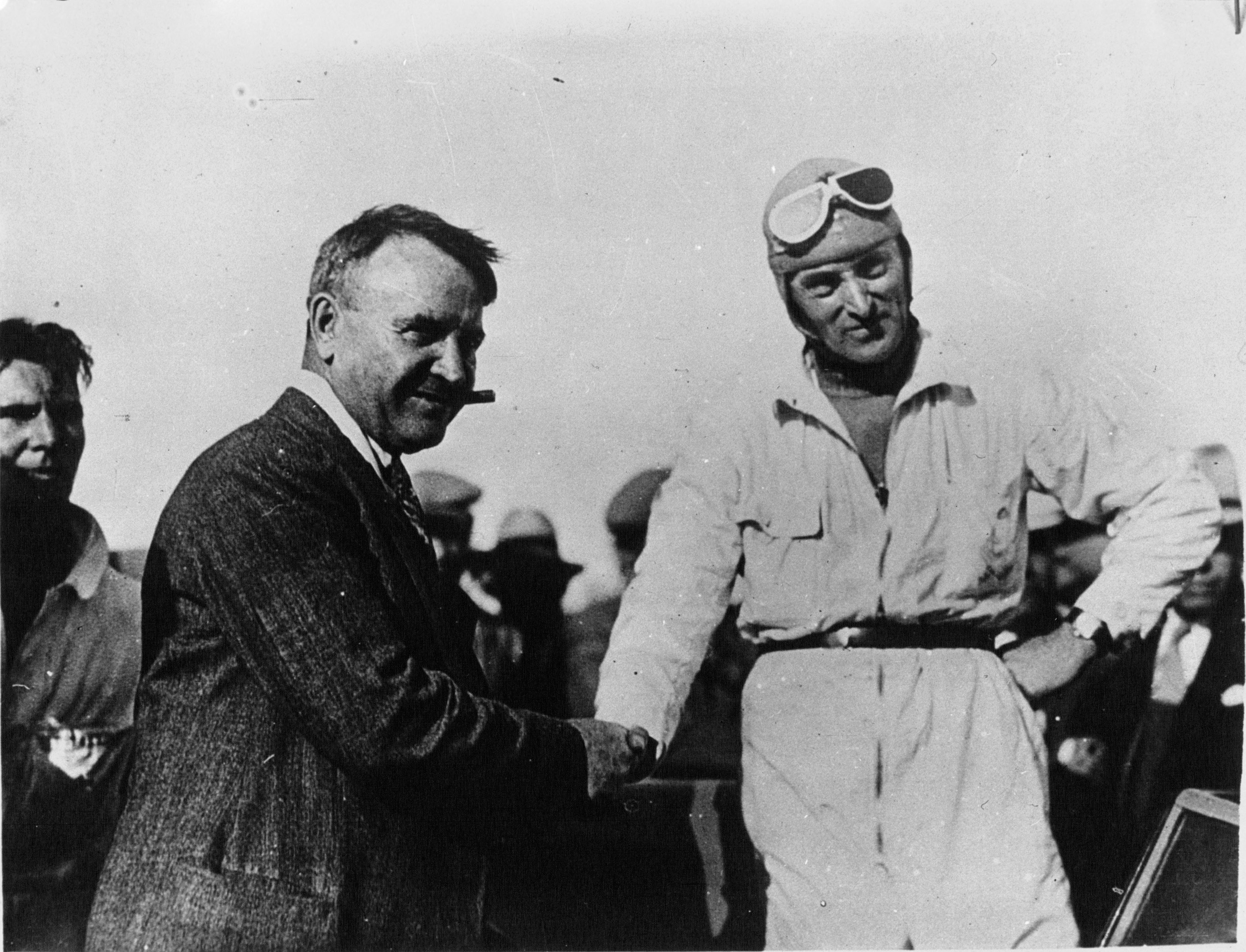 Barney Oldfield, à gauche, sir Malcolm Cambell's à droite.